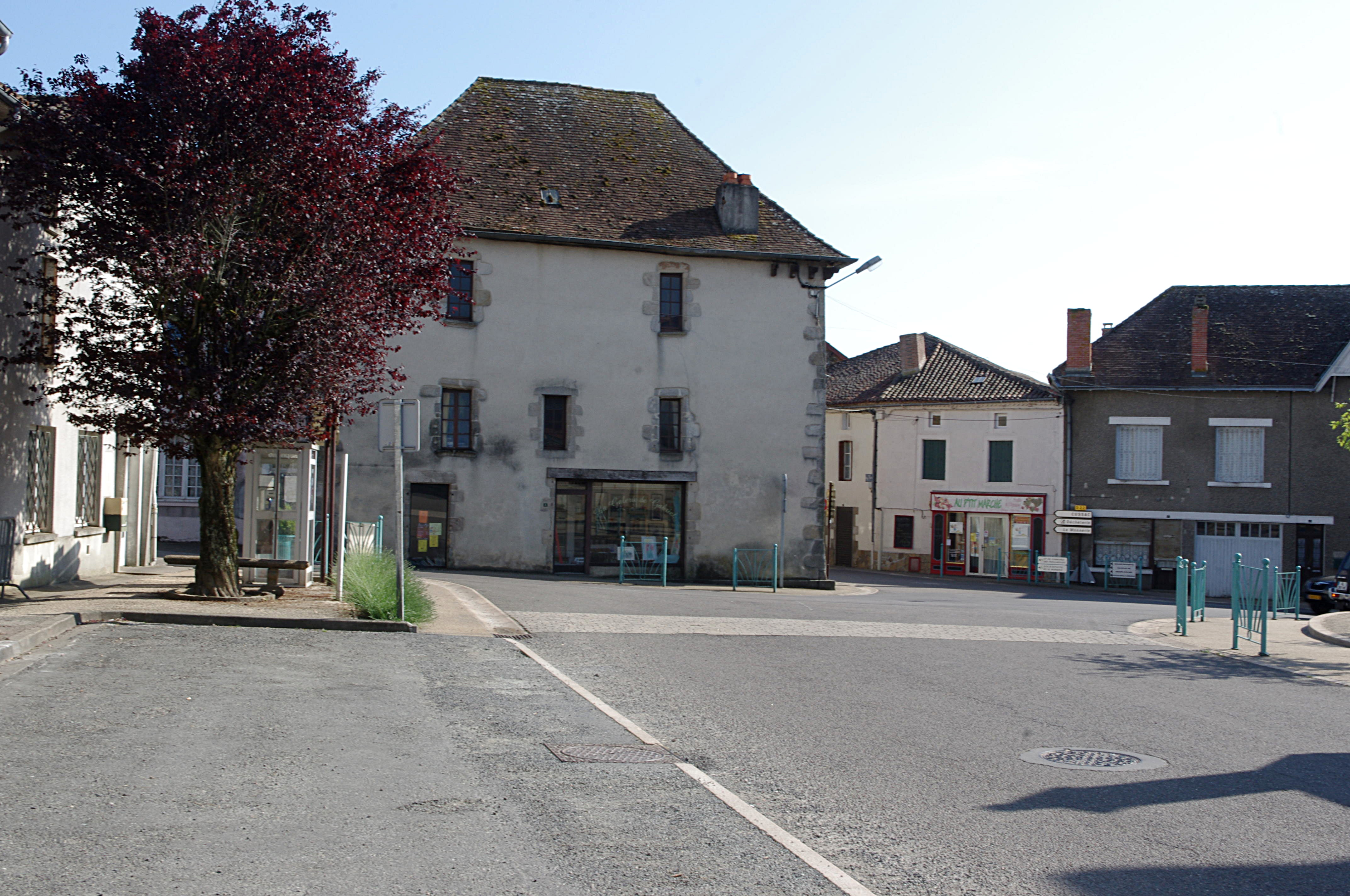 Place à côté de l'église de Oradour sur Vayre, Haute Vienne, France.